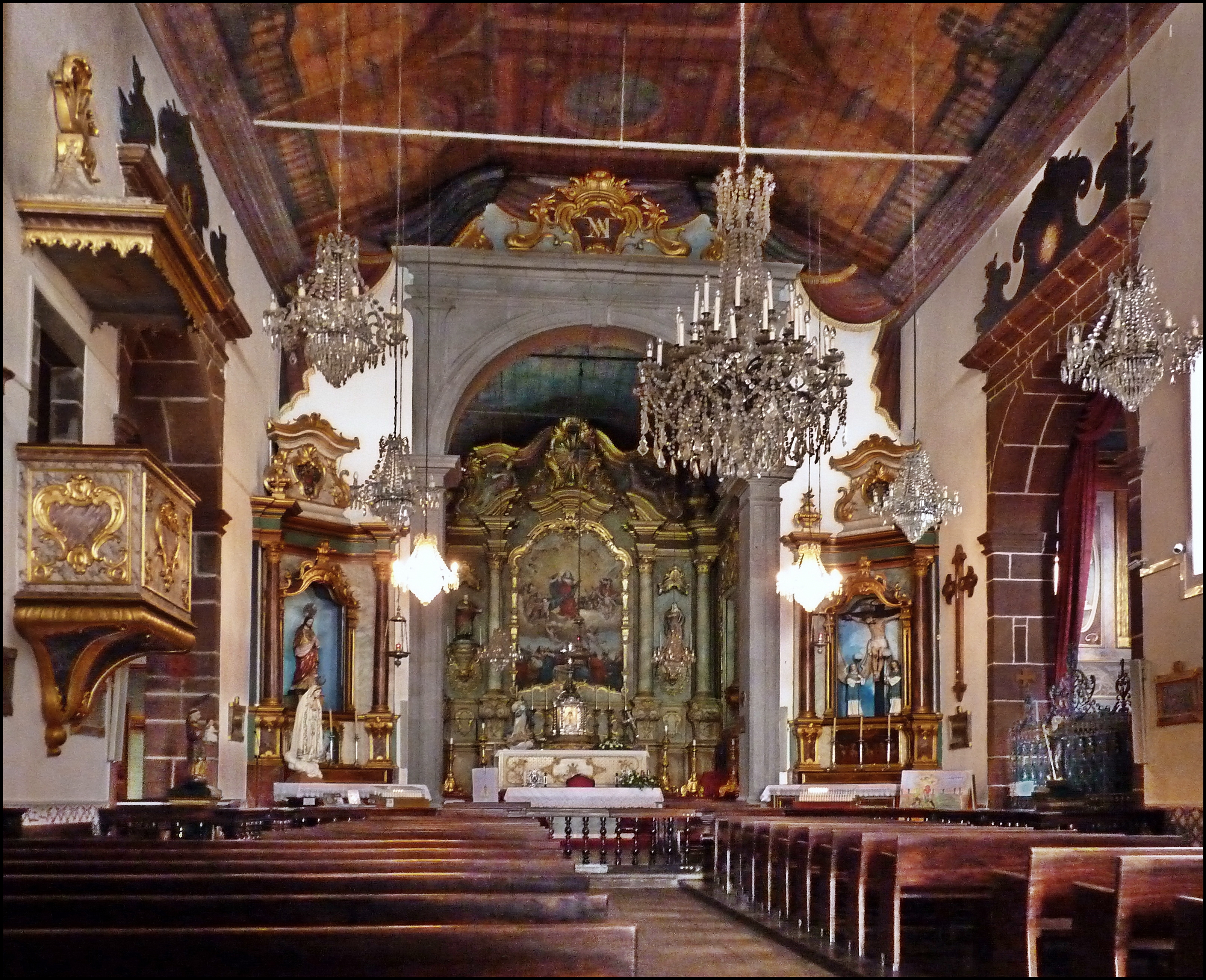 Igreia Nossa Senhora do Monte